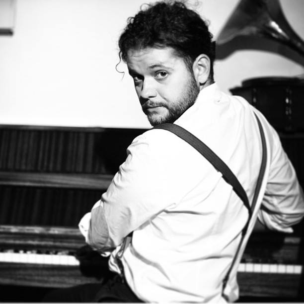 regizor roman Bucuresti